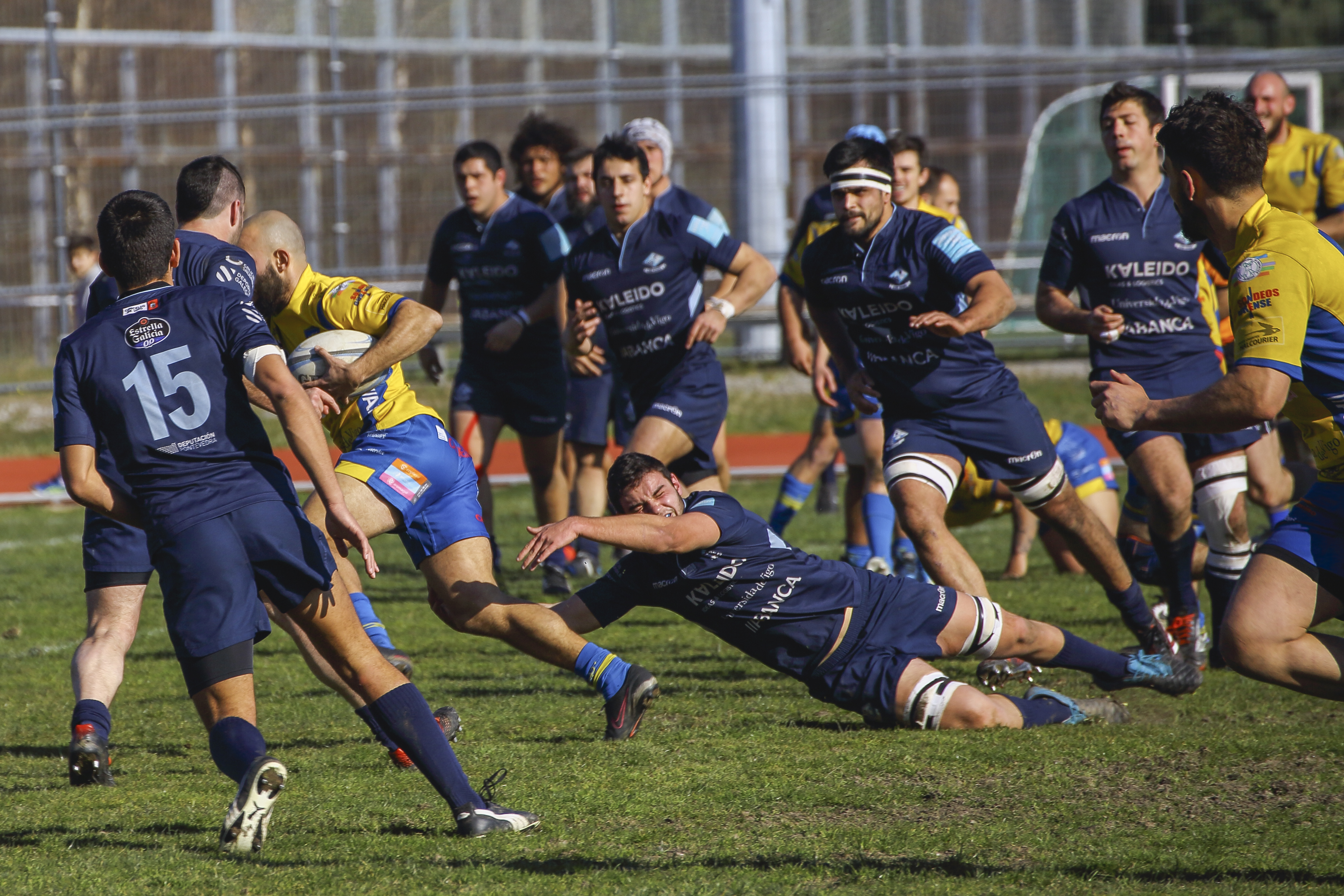 Partido disputado en As Lagoas, entre los dos equipos gallegos de la División de Honor B Grupo A, donde ganaron los locales 34 a 19.